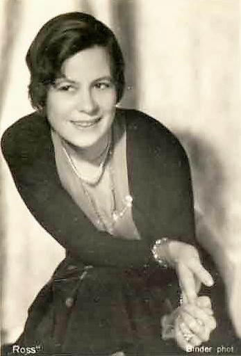 Maria Bard